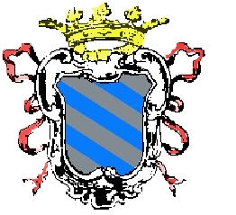 araldo di gattara azzurro argento